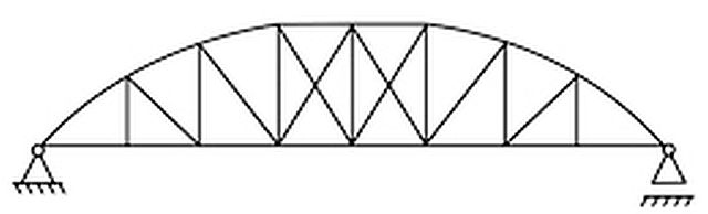 Schwedler-Träger mit horizontalem Obergurt sowie Gegendiagonalen im Mittelteil